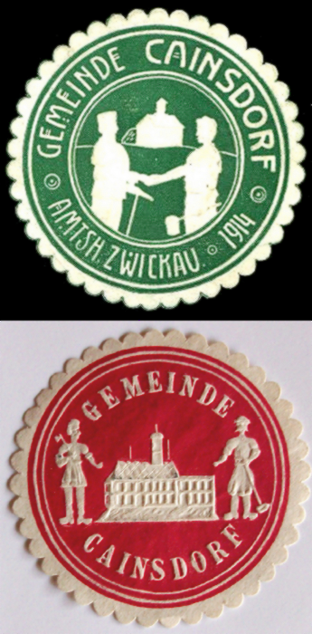 Alte Siegelmarken (Amtssiegel) der ehemalig selbständigen Gemeinde Cainsdorf. Im Gebrauch zw. 1870 und 1918